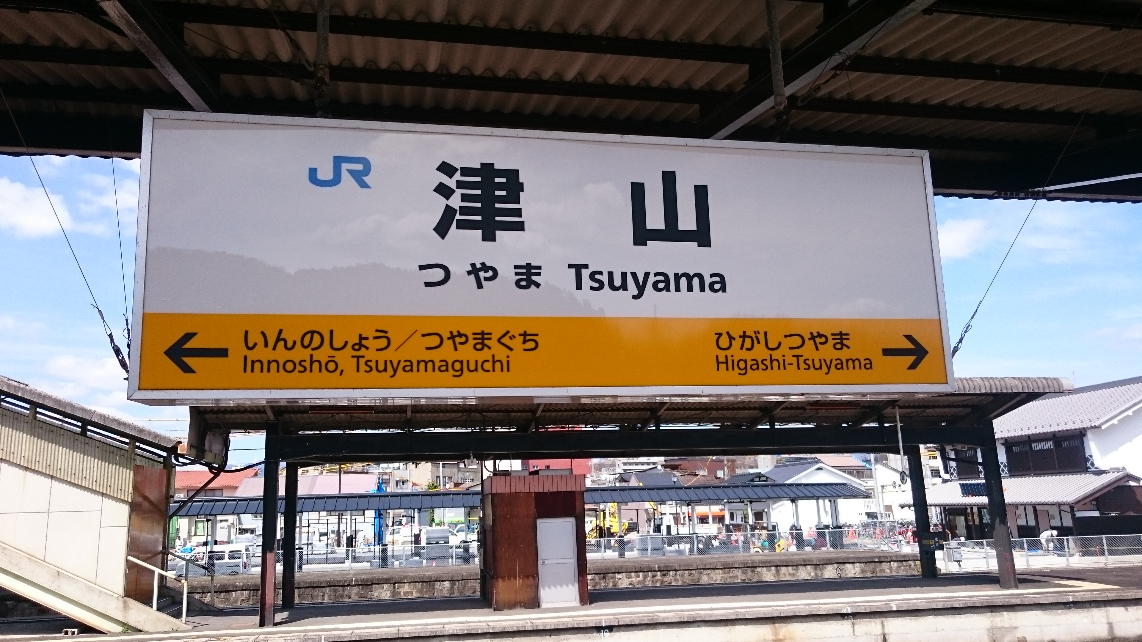 路線記号導入後の津山駅4番のりば(津山線ホーム)の駅名標です